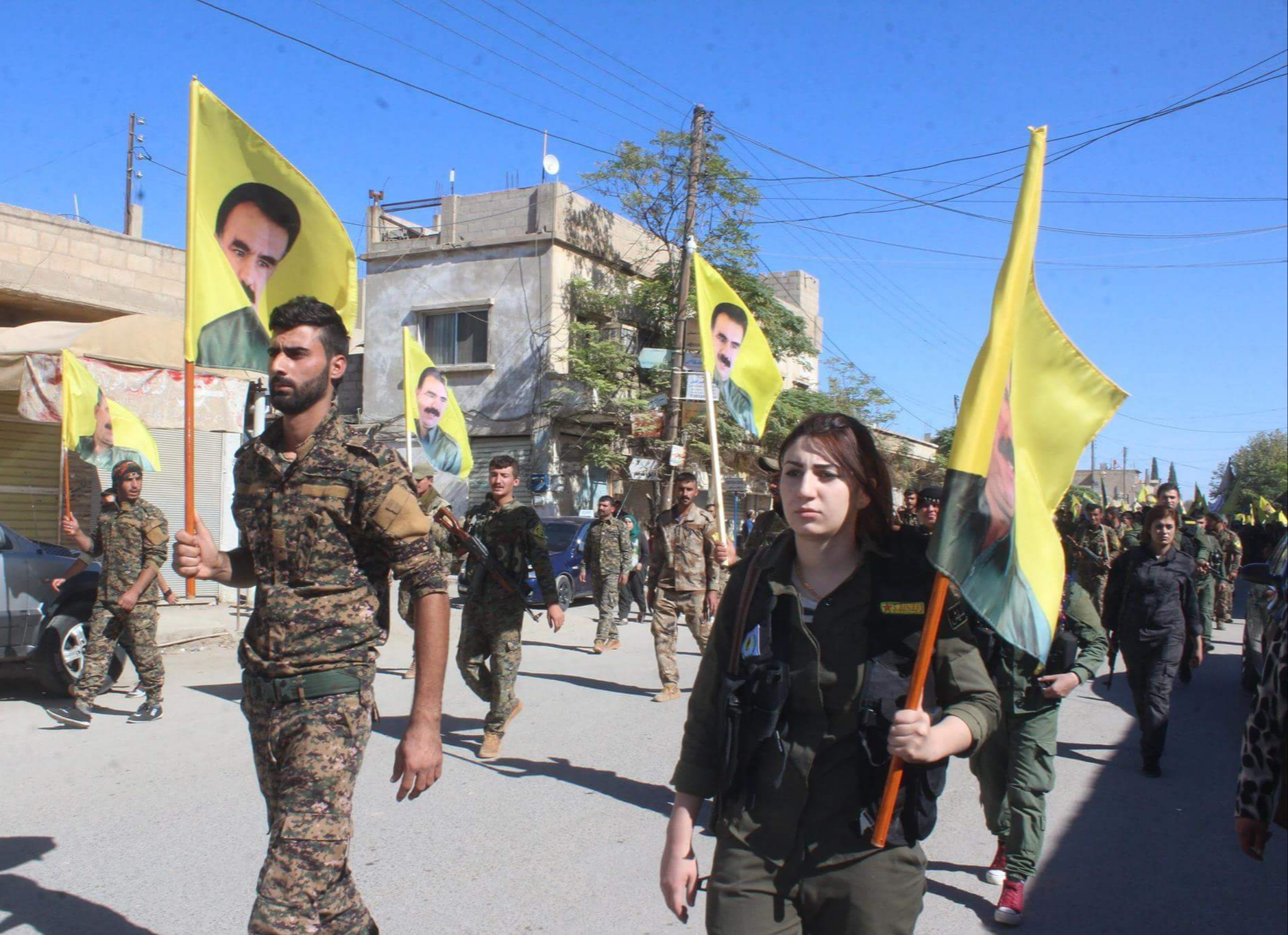 Efrin YPG